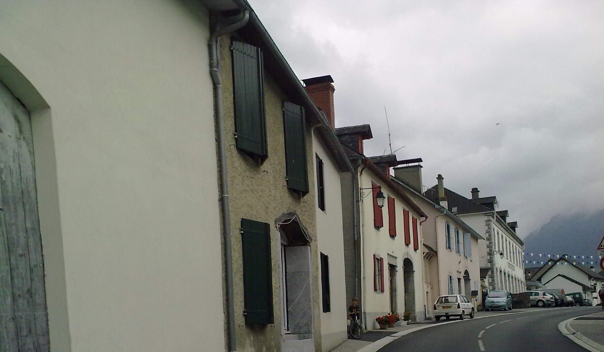 Arette le 4 juillet 2010.